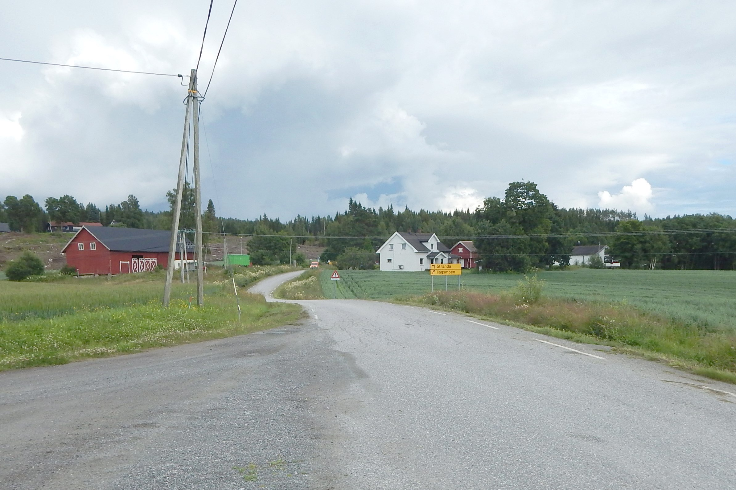 Ilagsvegen (fylkesvei 1982, tidl. 346) mot Nedgarden Ilag